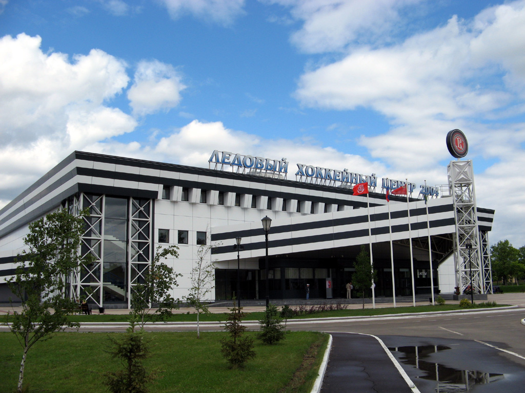 Ледовый хоккейный центр в г. Чехов (Московская область); Ice hockey center in Chekhov (Moscow Oblast)